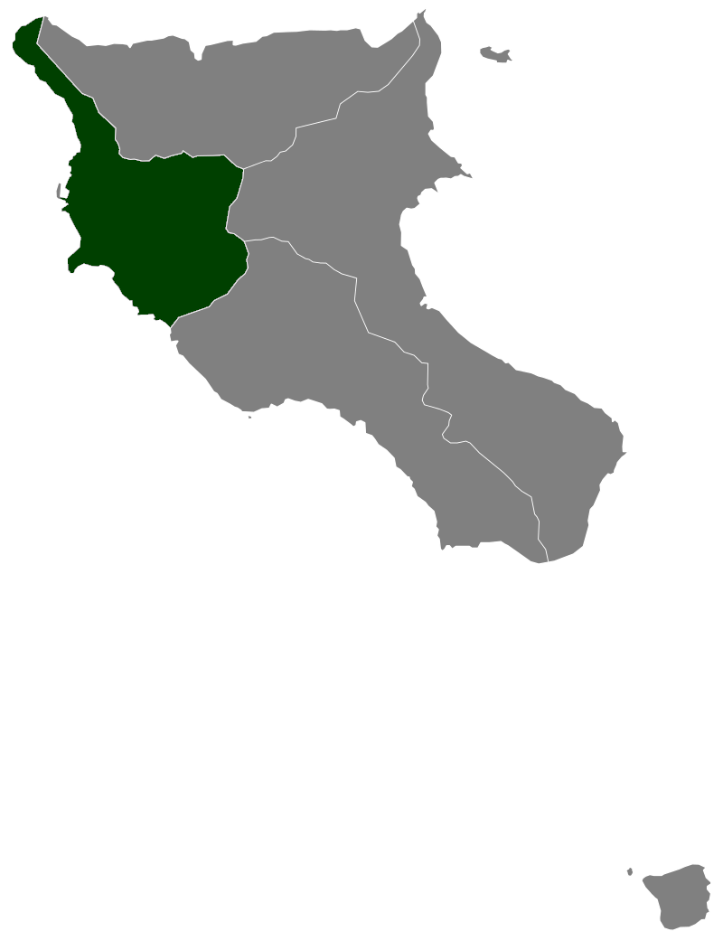 椰油村行政區劃